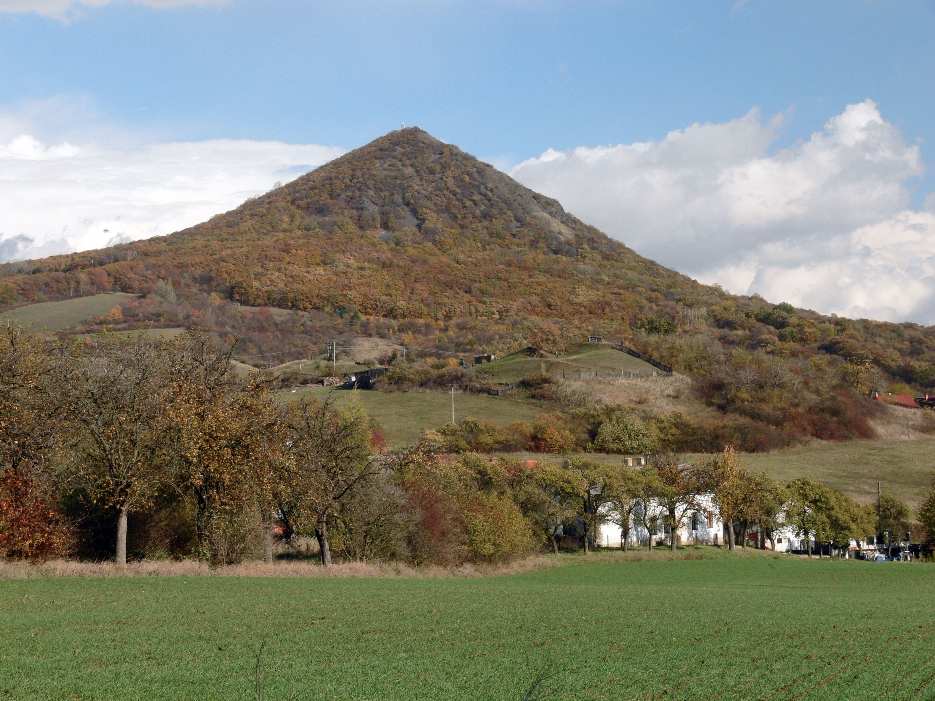 Pohled na Lovoš od JZ